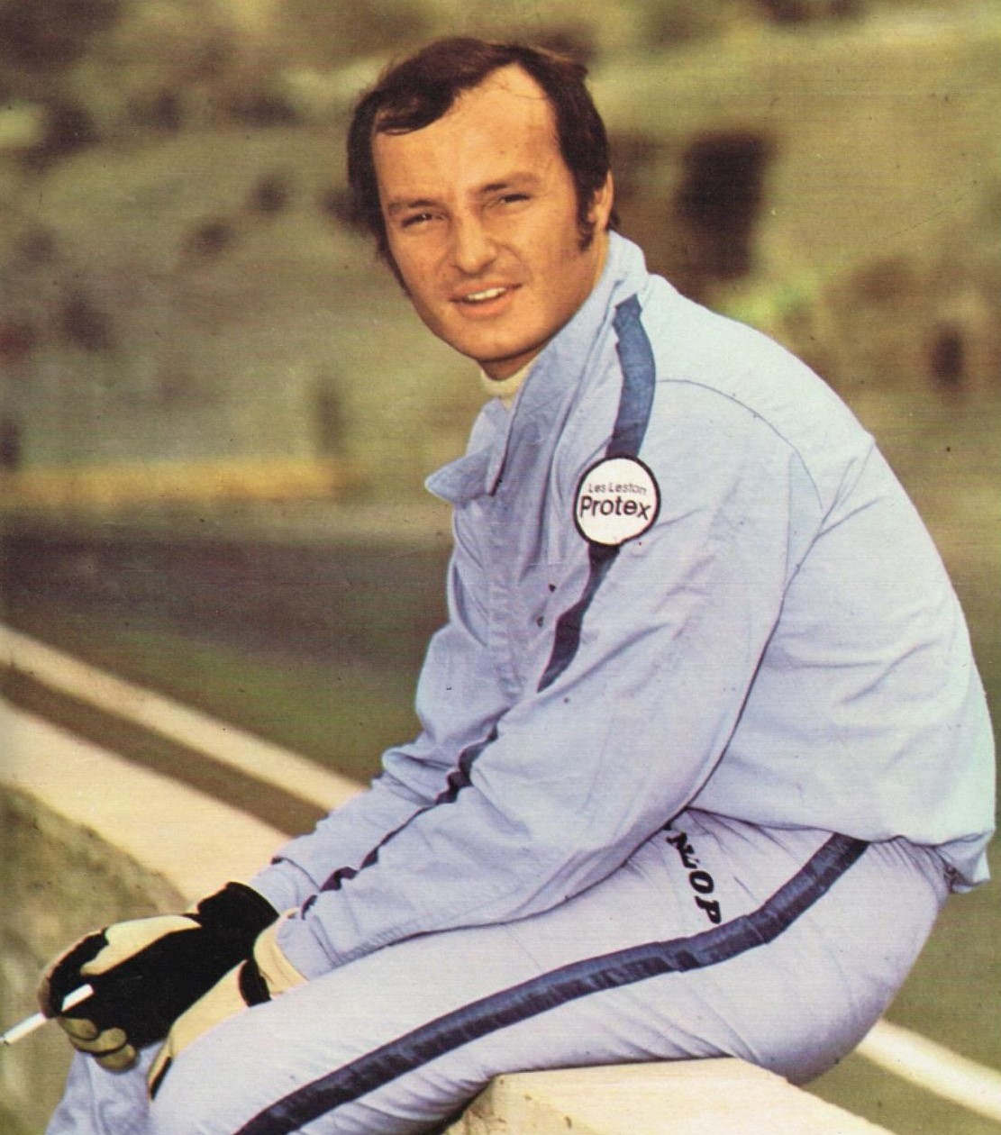 Andrea Vianini en 1969, fotografía de revista Automundo